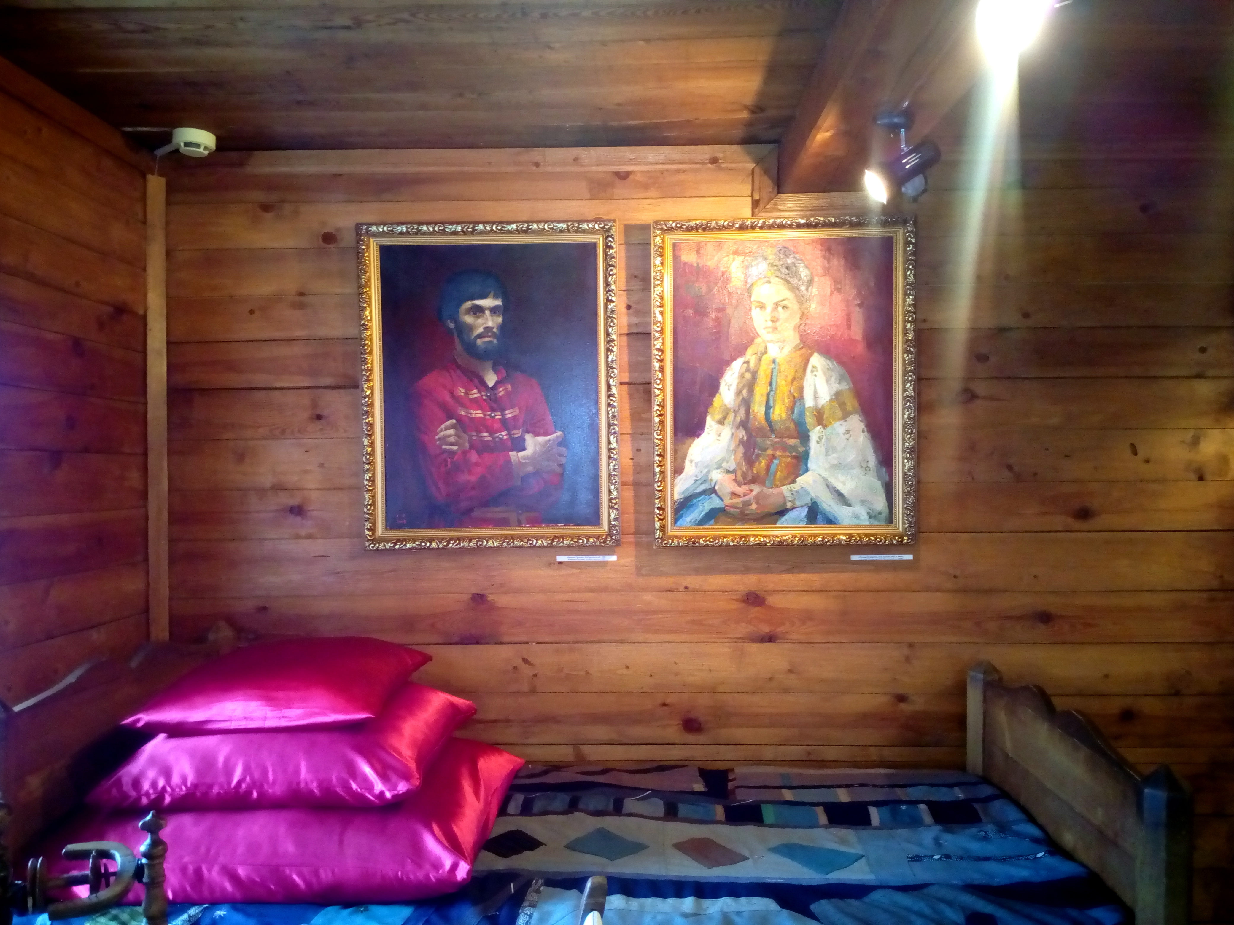 Дом-музей Емельяна Пугачева